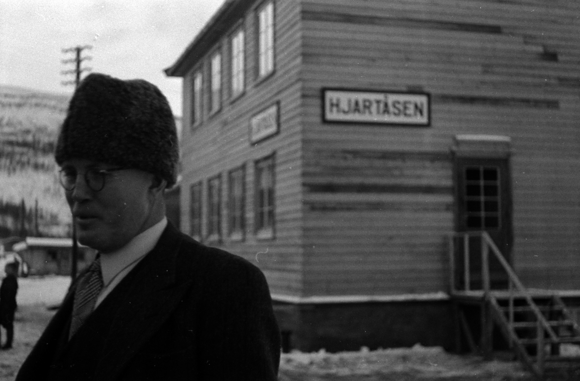 Ekstratog Mo i Rana–Lønsdal gjør et opphold ved Hjartåsen stasjon mandag 8. desember 1947. Foto: Adolf Skjegstad. Fra Domkirkeoddens fotosamling i Digitalt museum.